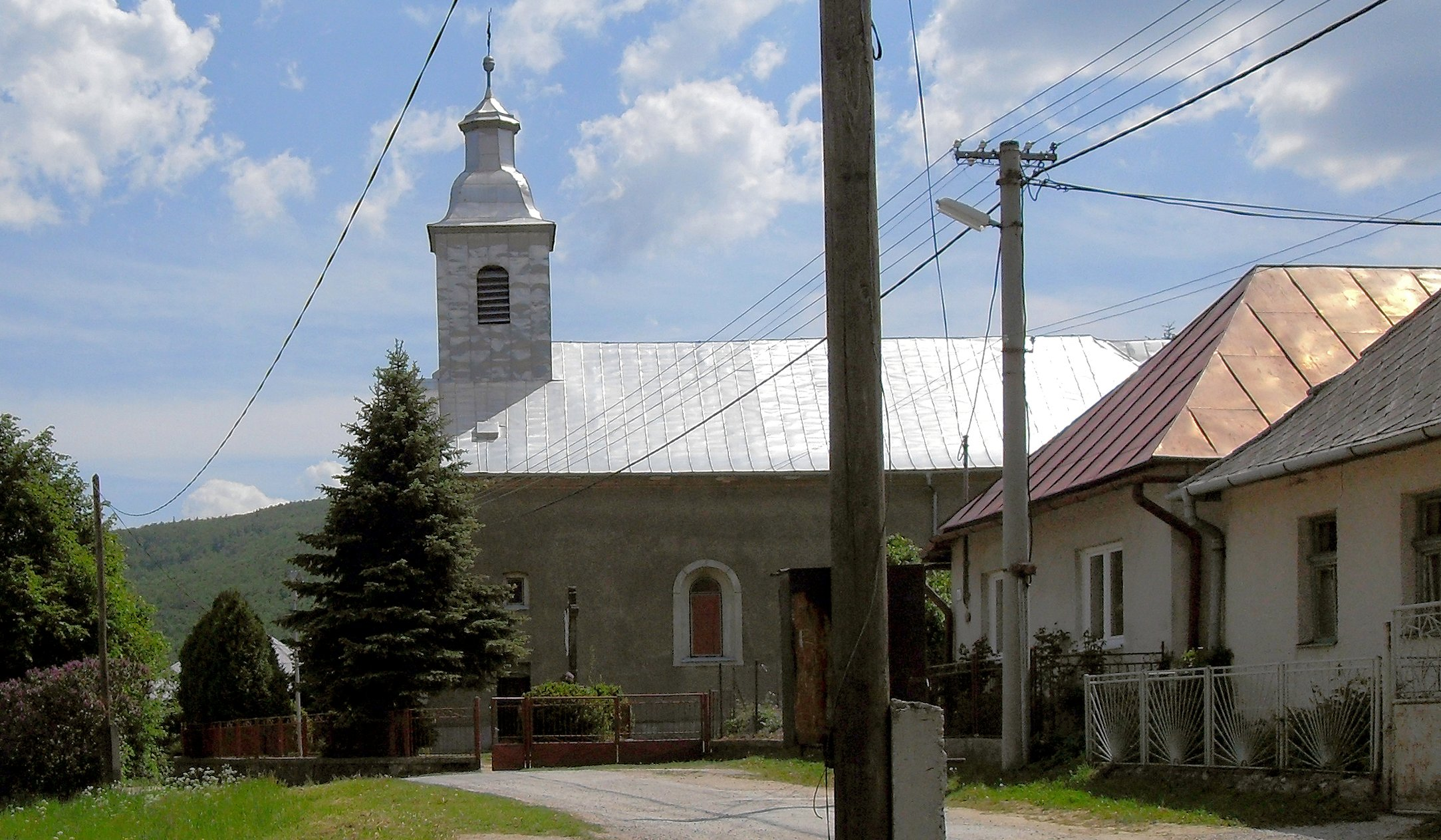 Zlata Idka, Rímskokatolícky kostol Všetkých svätých